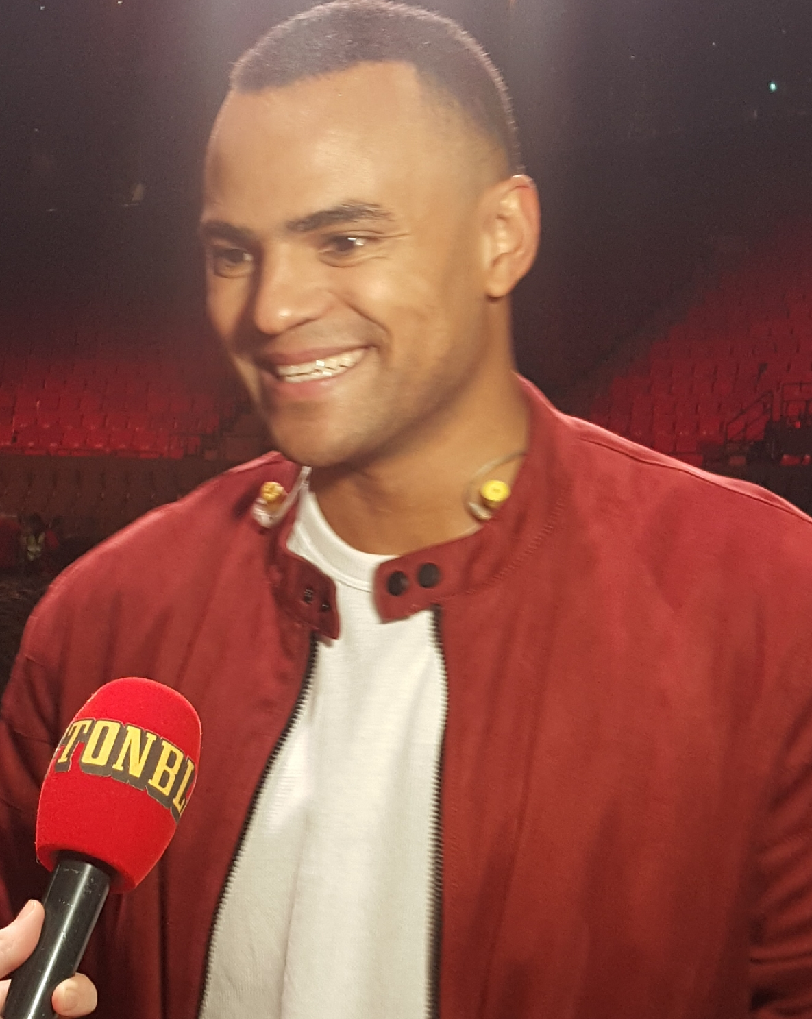 Szwedzki piosenkarz Mohombi po pierwszym półfinale Melodifestivalen 2019.